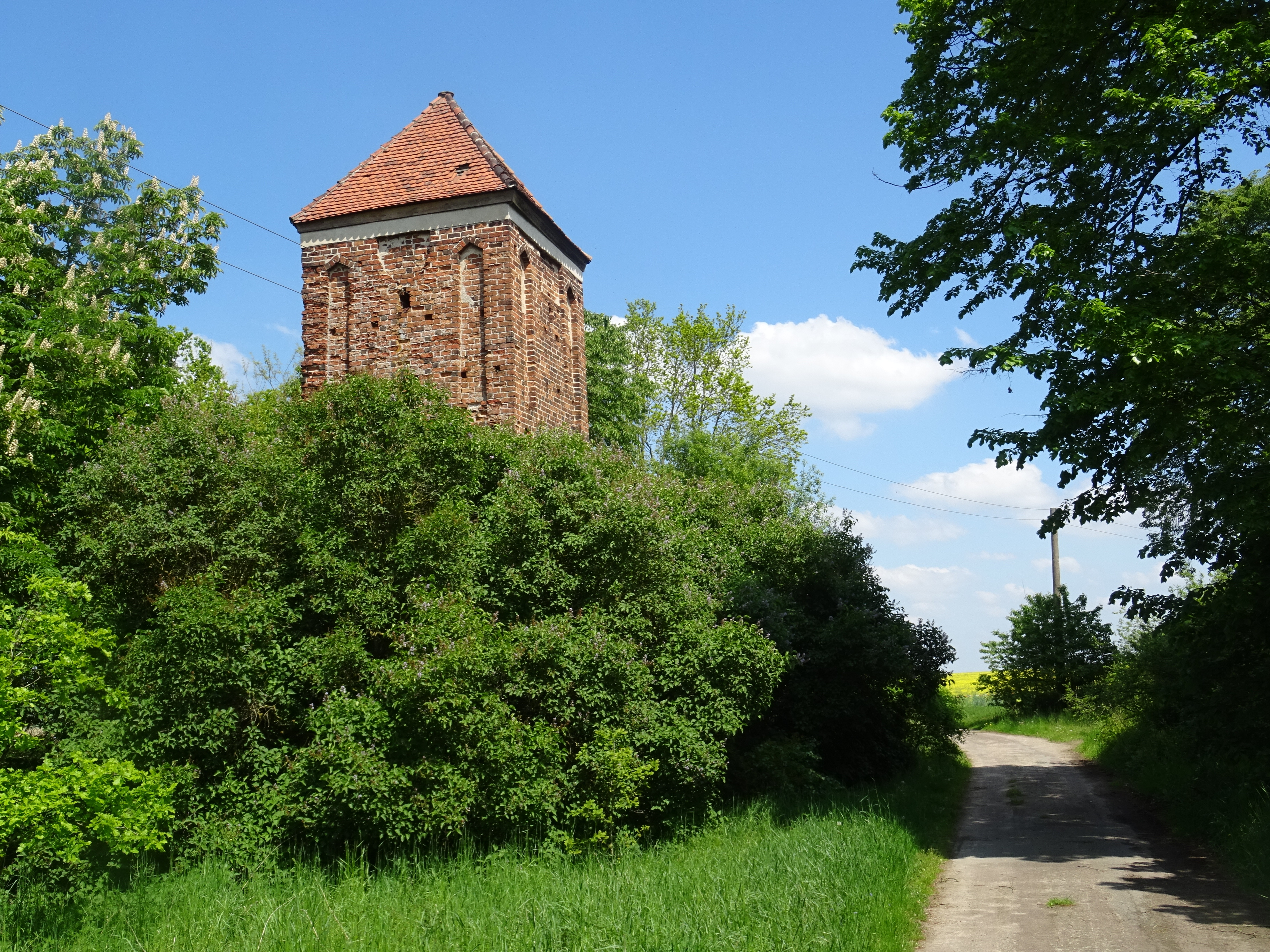 Deetzer Warthe, westlich des Ortsteils der Stadt Bismark (Altmark), denkmalgeschützt